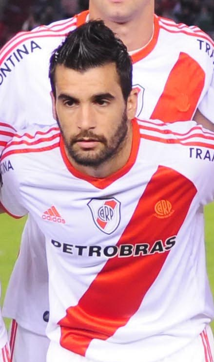 Una formación del equipo de River Plate en la temporada 2011/12, cuando descendió a la Primera B Nacional, segunda división del fútbol argentino, por primera vez en su historia, luego de caer en la serie eliminatoria de la Promoción ante Belgrano de Córdoba.